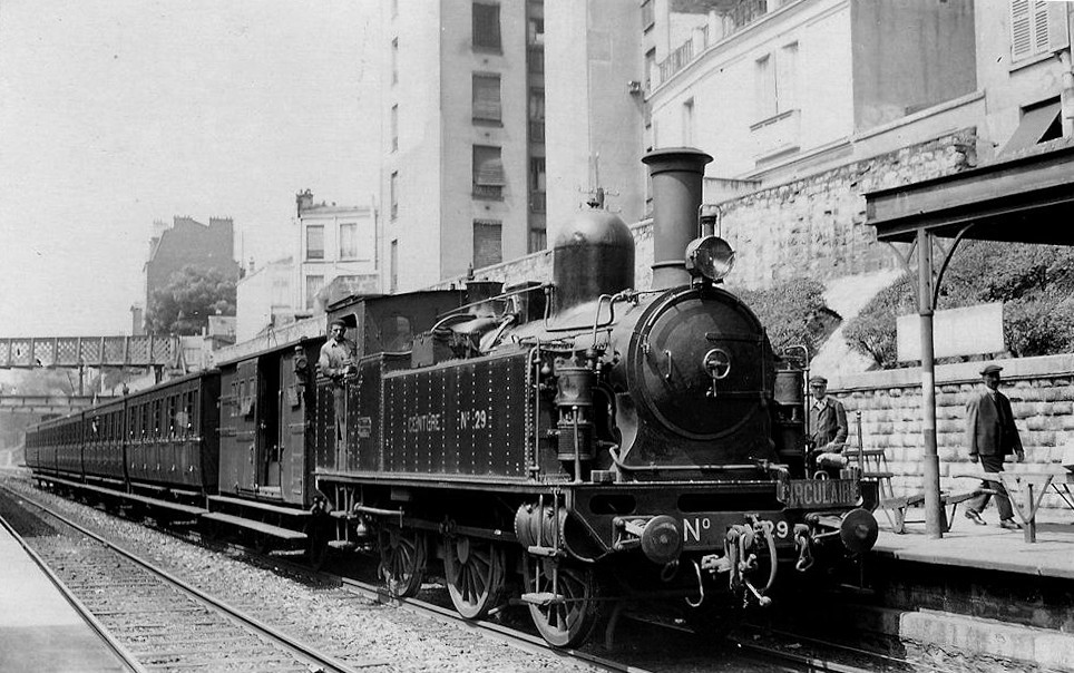 La locomotive Boer Ceinture n° 29 en tête d'un train sur la ligne de petite ceinture.